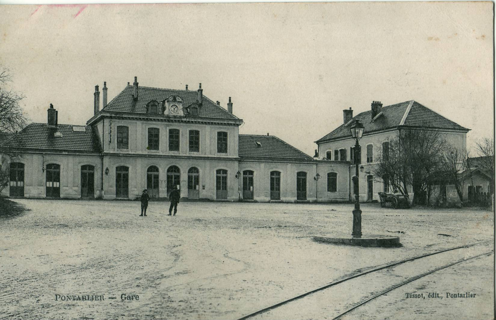 Carte postale ancienne éditée par Tissot à Pontarlier : PONTARLIER - La Gare